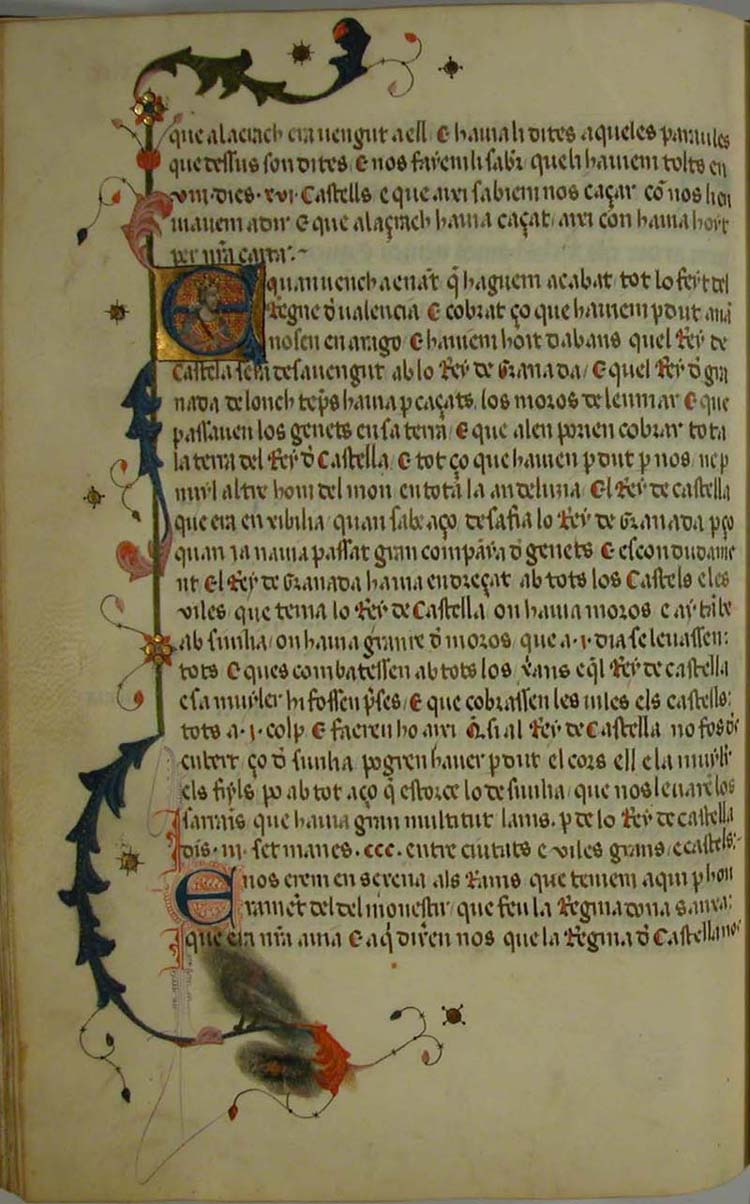 Libre dels Feyts